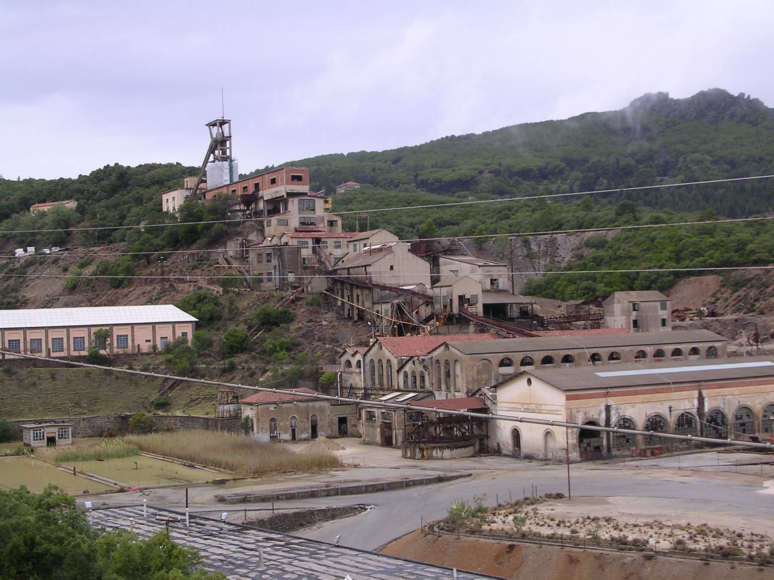 Montevecchio, la miniera di levante